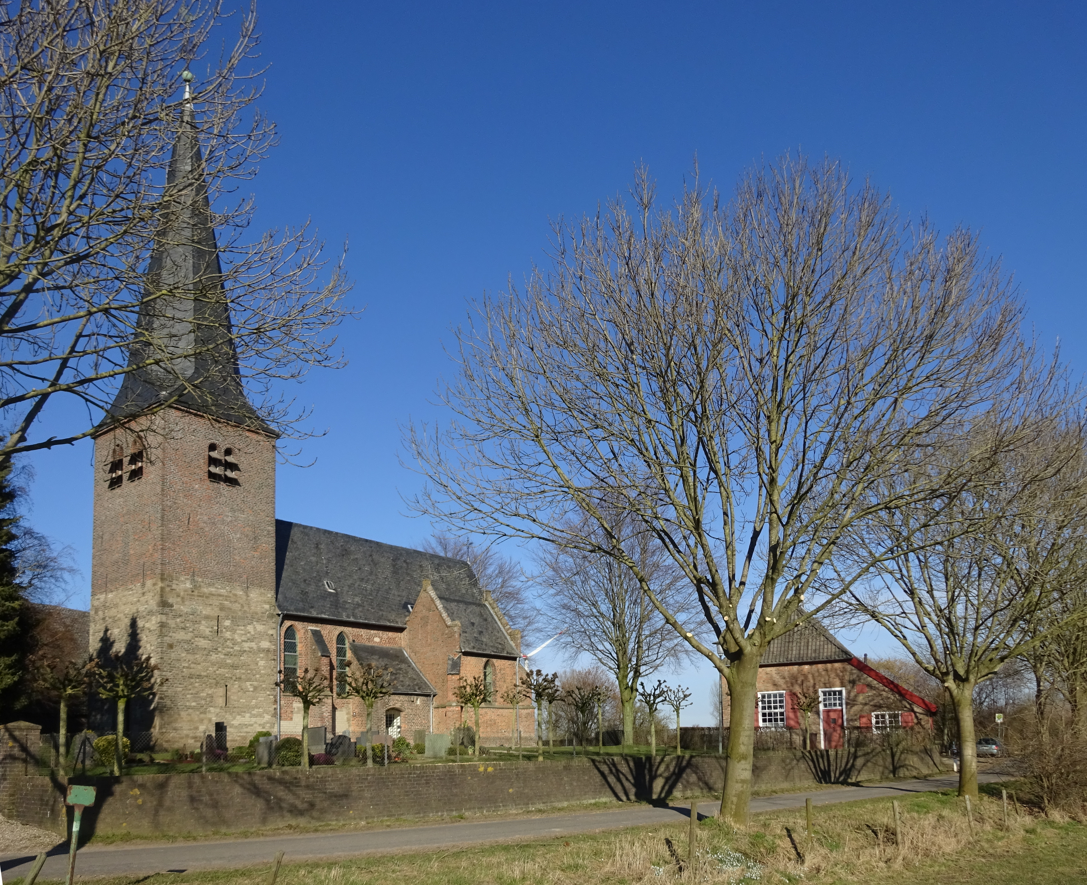 Kalkar-Hanselaer, Spickstraße 83. St. Antonius Abbas en bouwkundig monument Kalkar nr. 31